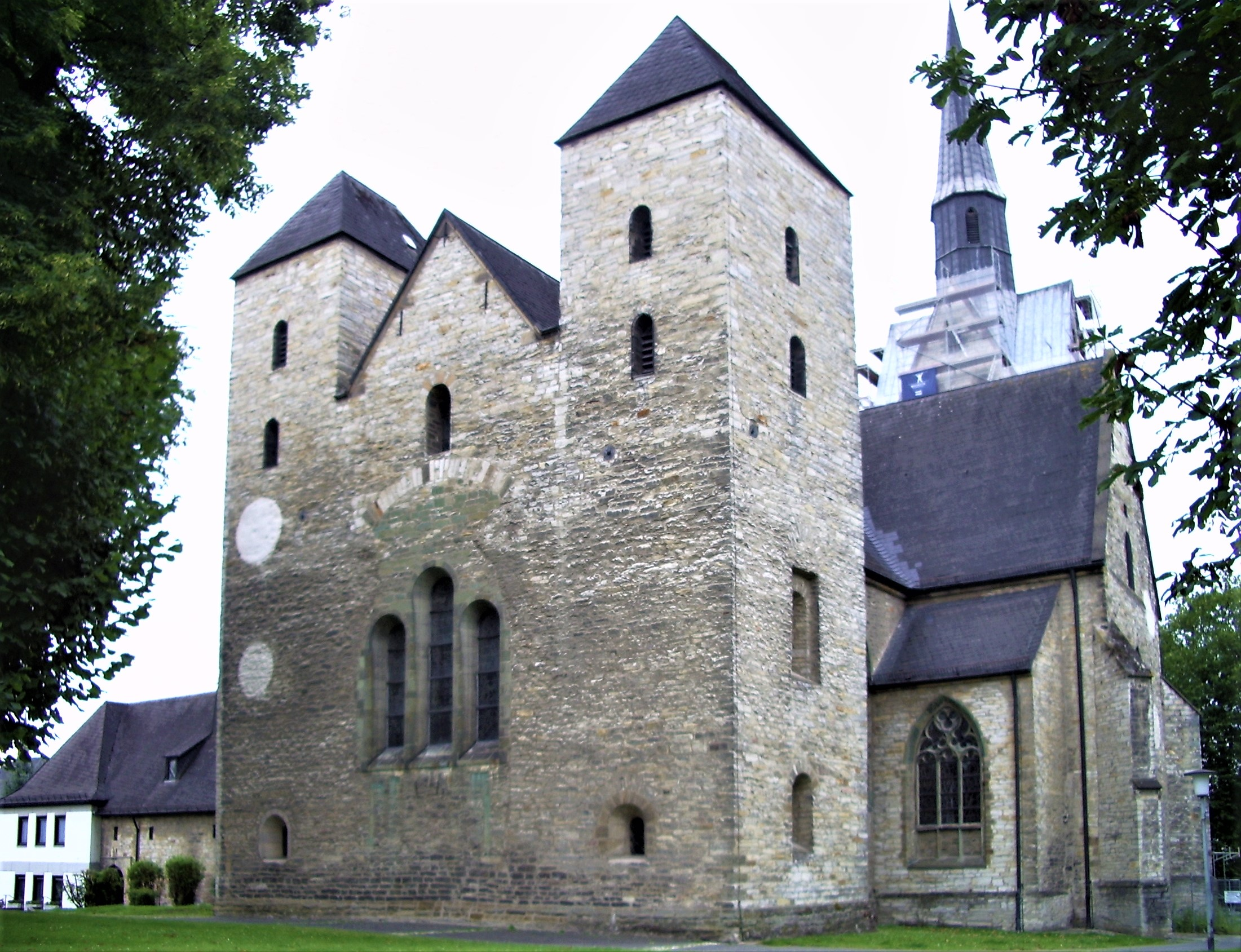 "Ostbau" Stiftskirche zu Geseke